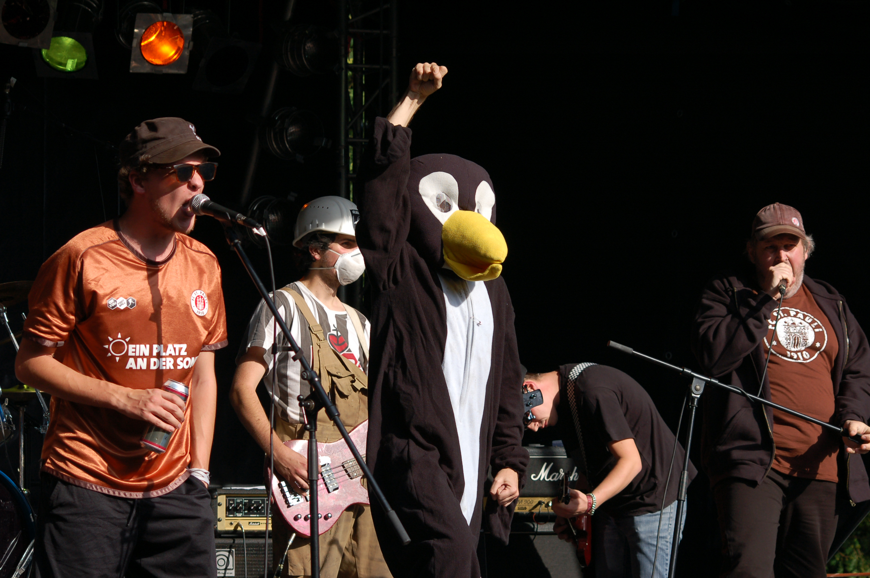 Kollmarlibre beim 1. Rock 'N' Rose Festival in Uetersen.